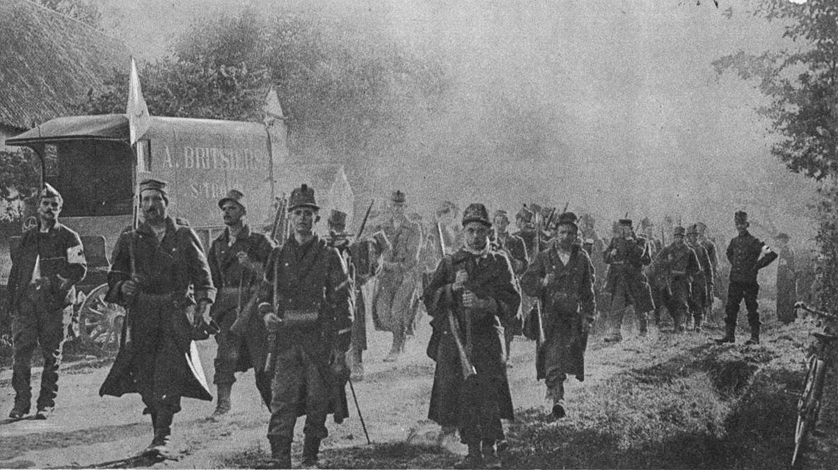 les_troupes_belges_allant_de_St-Trond_à_Tirlemont, publication de l'hebdomadaire Le Miroir.